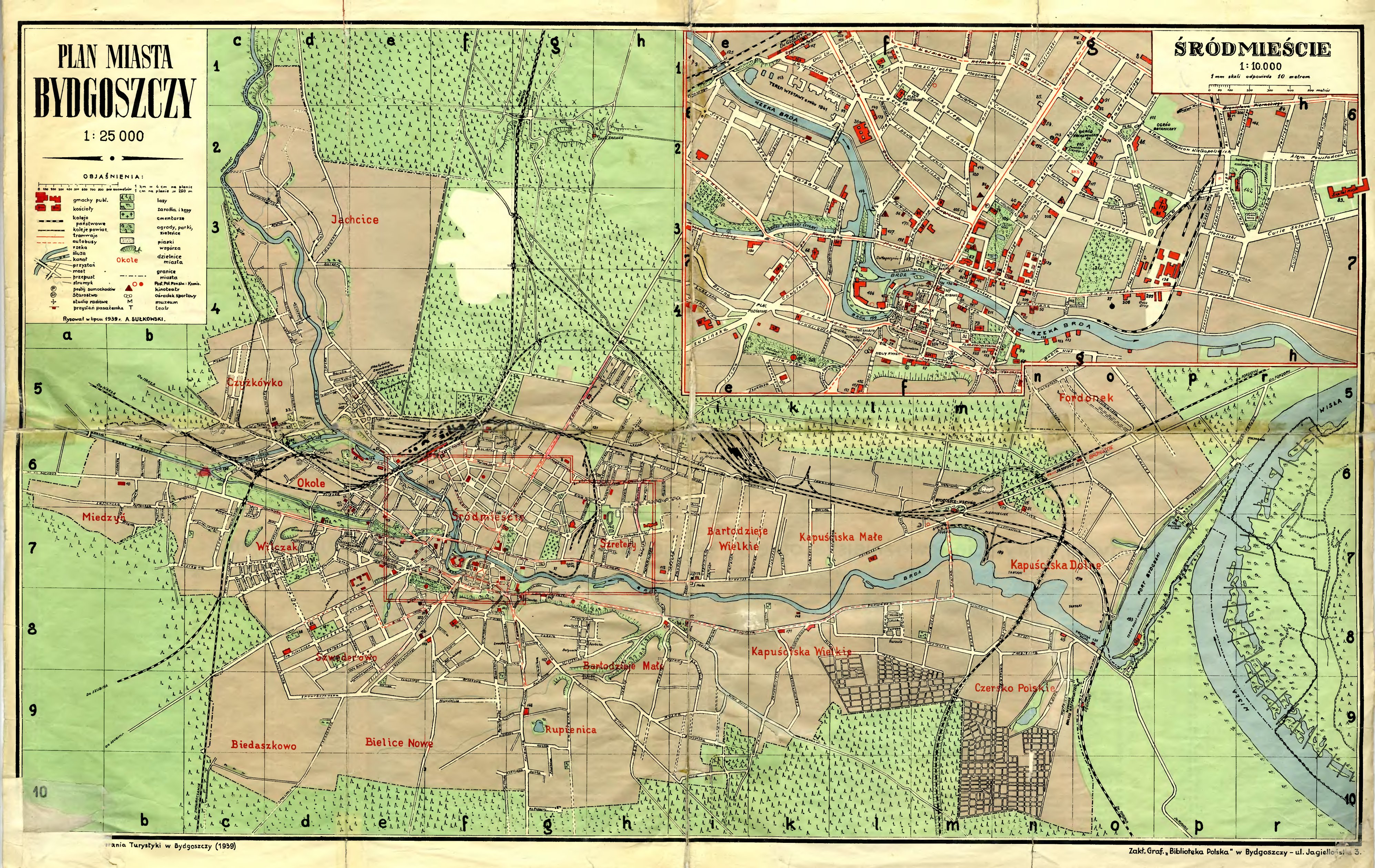 Plan miasta Bydgoszczy, stan lipiec 1939 r.